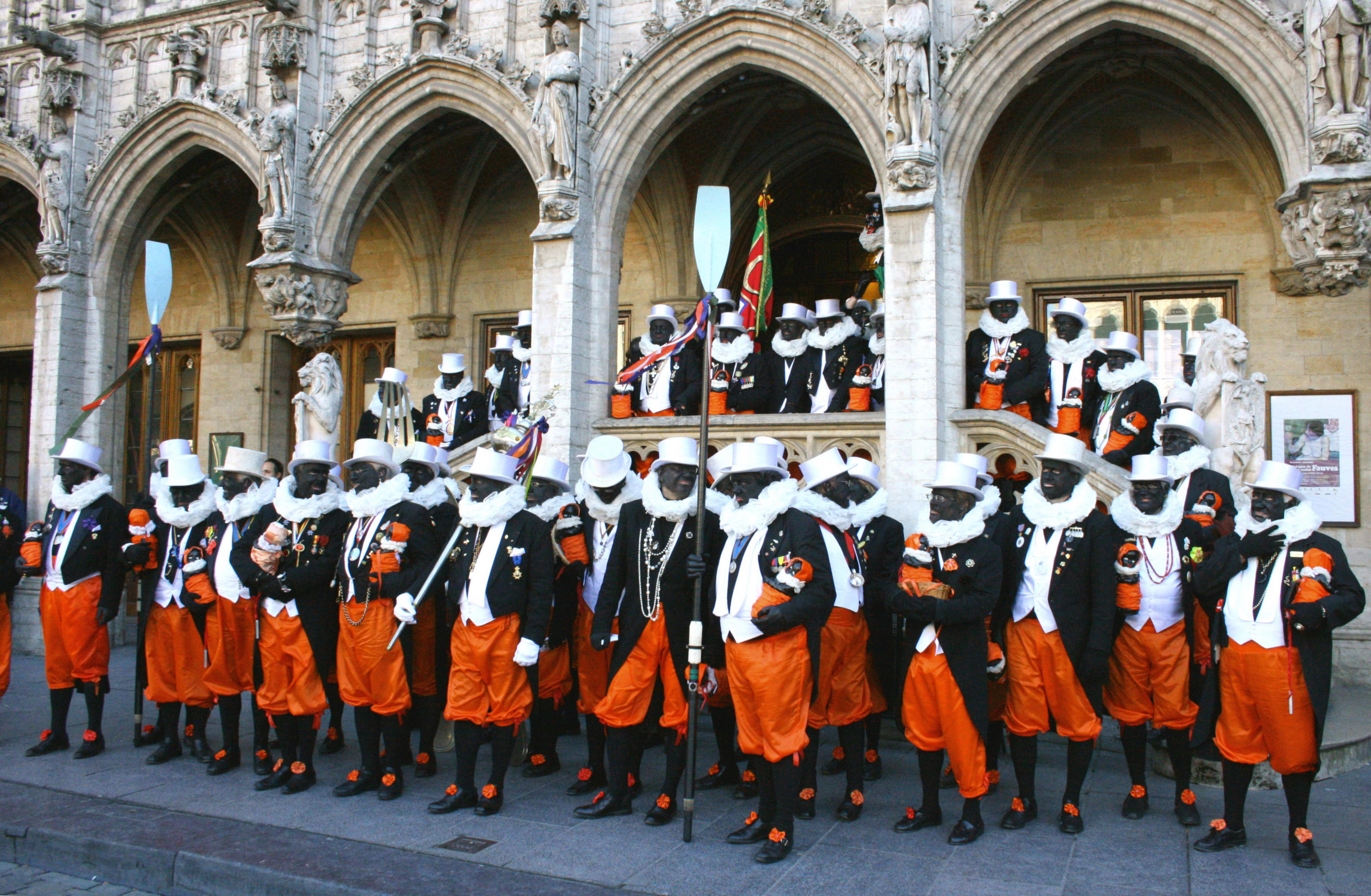 Les «Noirauds»: association caritative bruxelloise fondée en 1876. Nom officiel: «Oeuvre royale des berceaux Princesse Paoloa - conservatoire Africain». Le 19 mars 2011 sur la Grand place devant l'Hôtel de Ville.